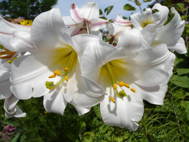 Lilium regale